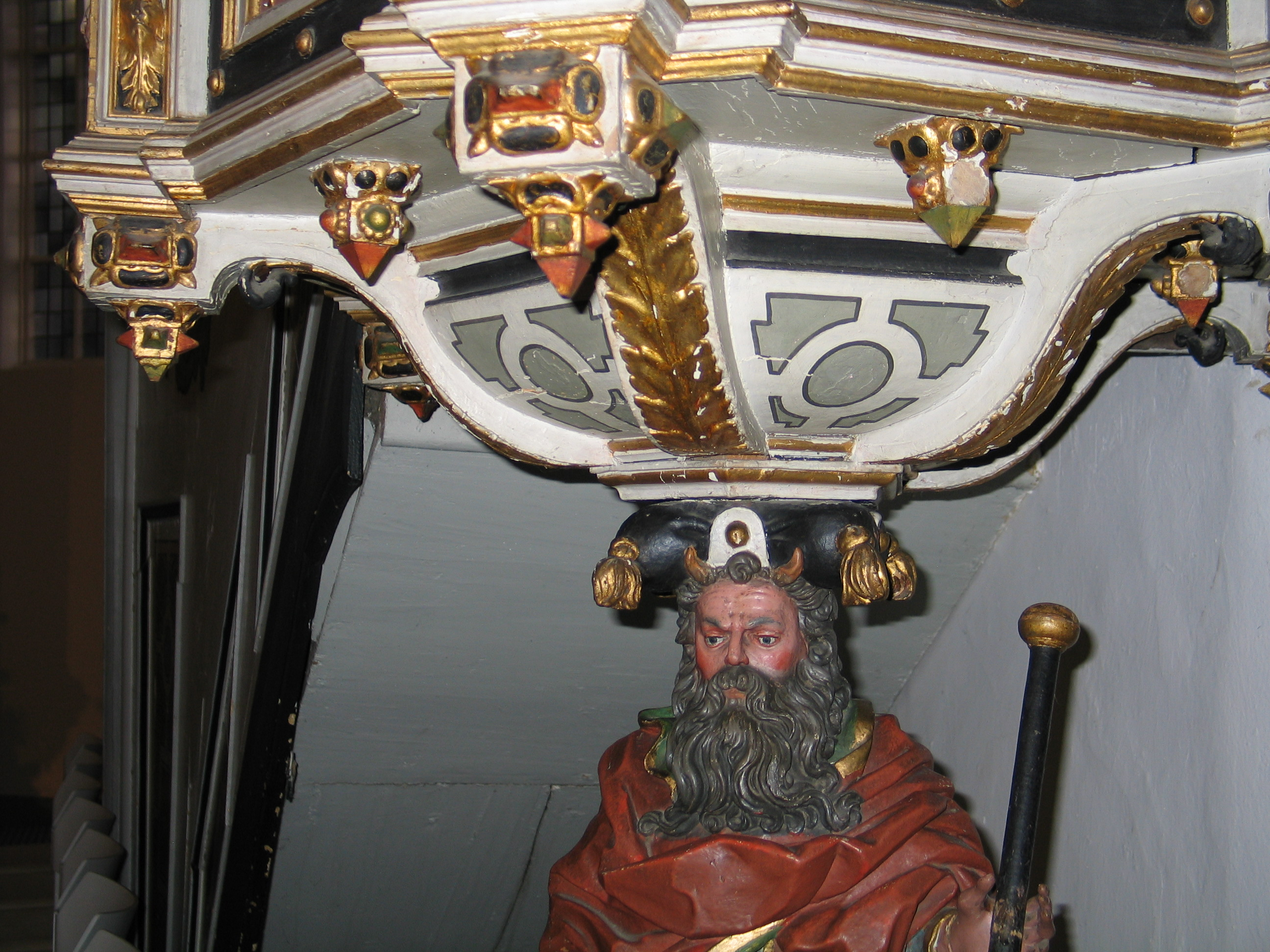 Detail Kanzel in St. Johanniskirche (Wolfenbüttel)